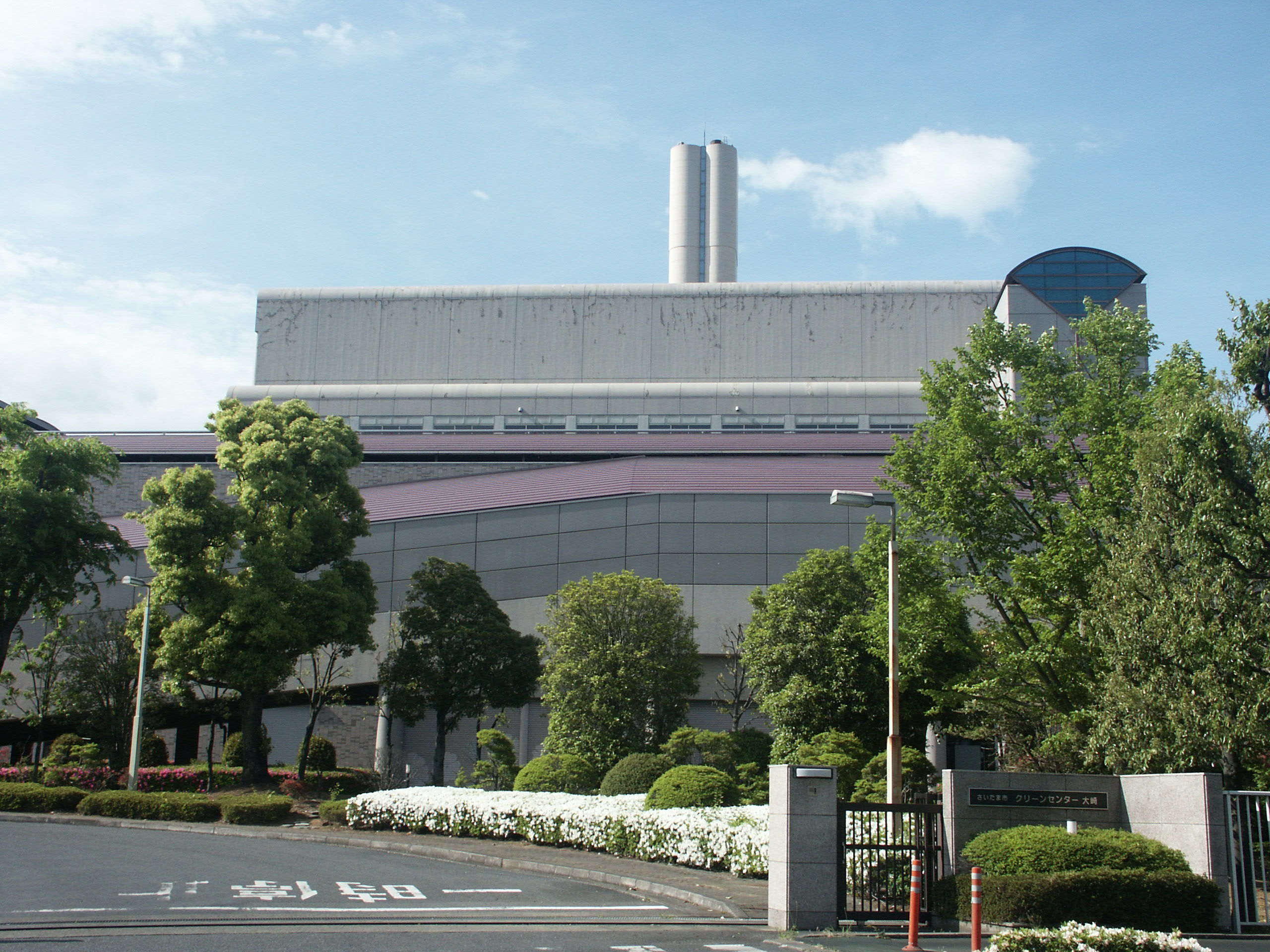 さいたま市クリーンセンター大崎（入口付近から撮影）